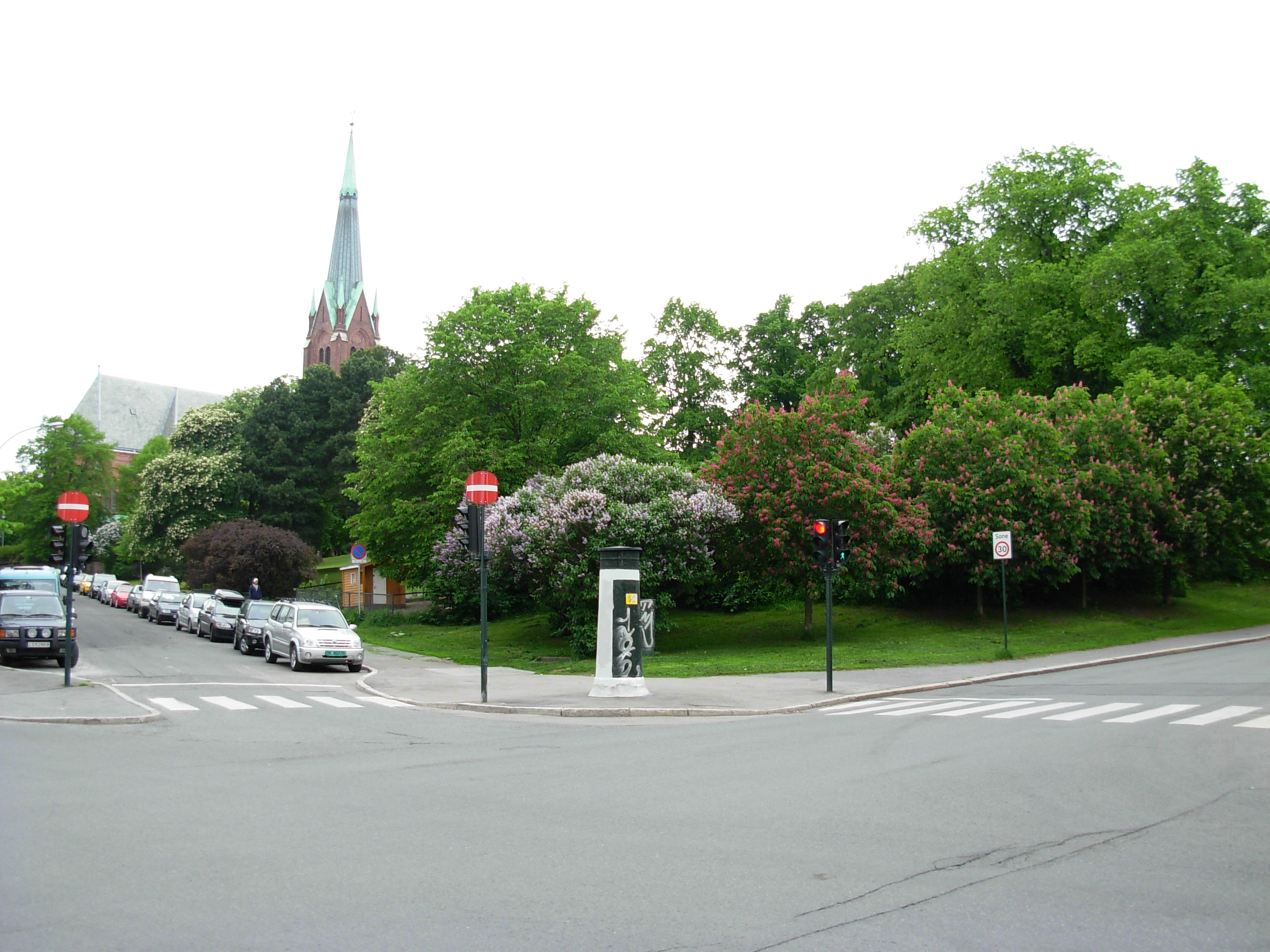 Uranienborgparken sett fra krysset Uranienborgveien / Josefines gate